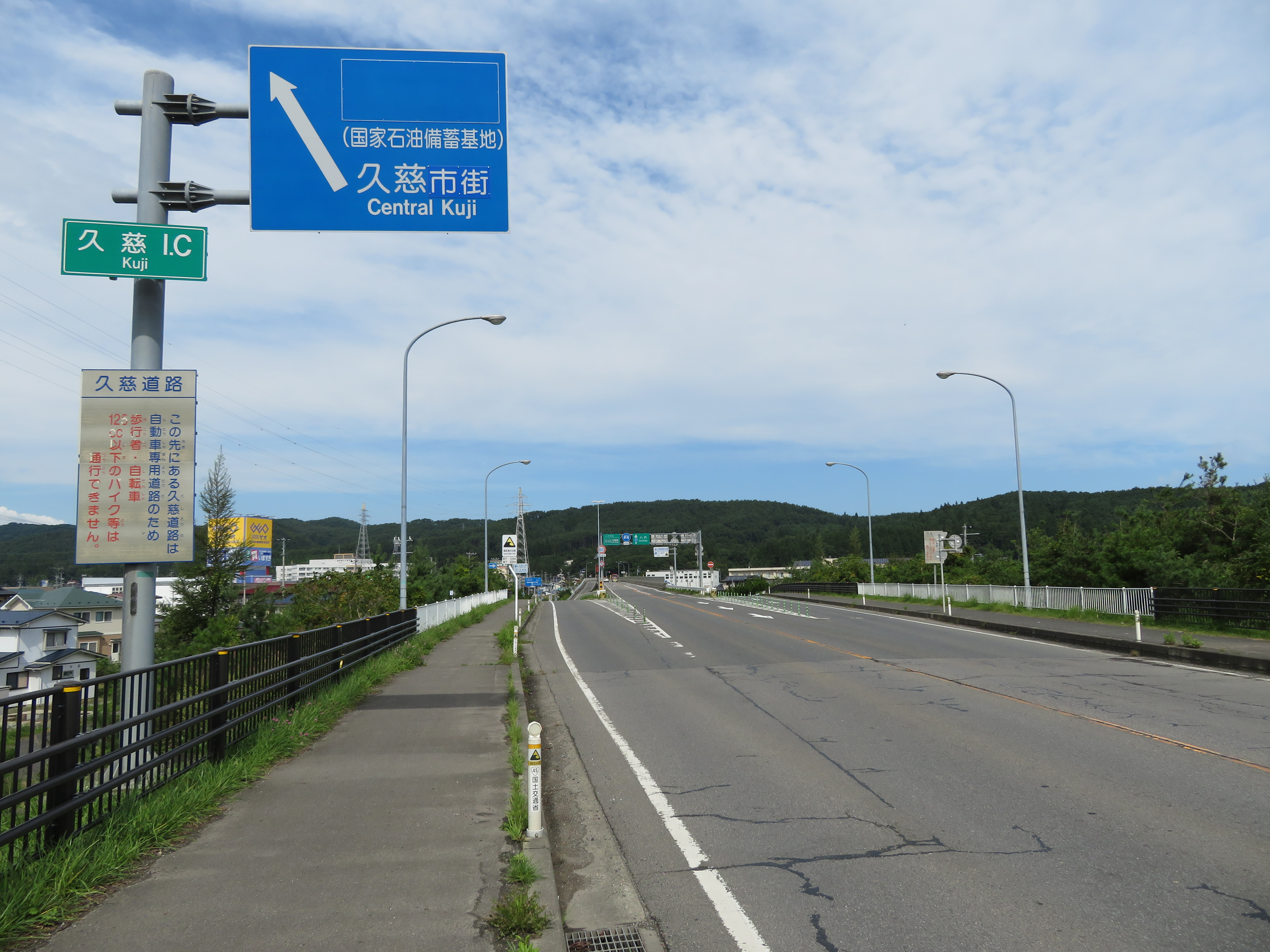 三陸北縦貫道路久慈インター出入口付近（久慈大橋側から撮影） Canon PowerShot SX720 HS